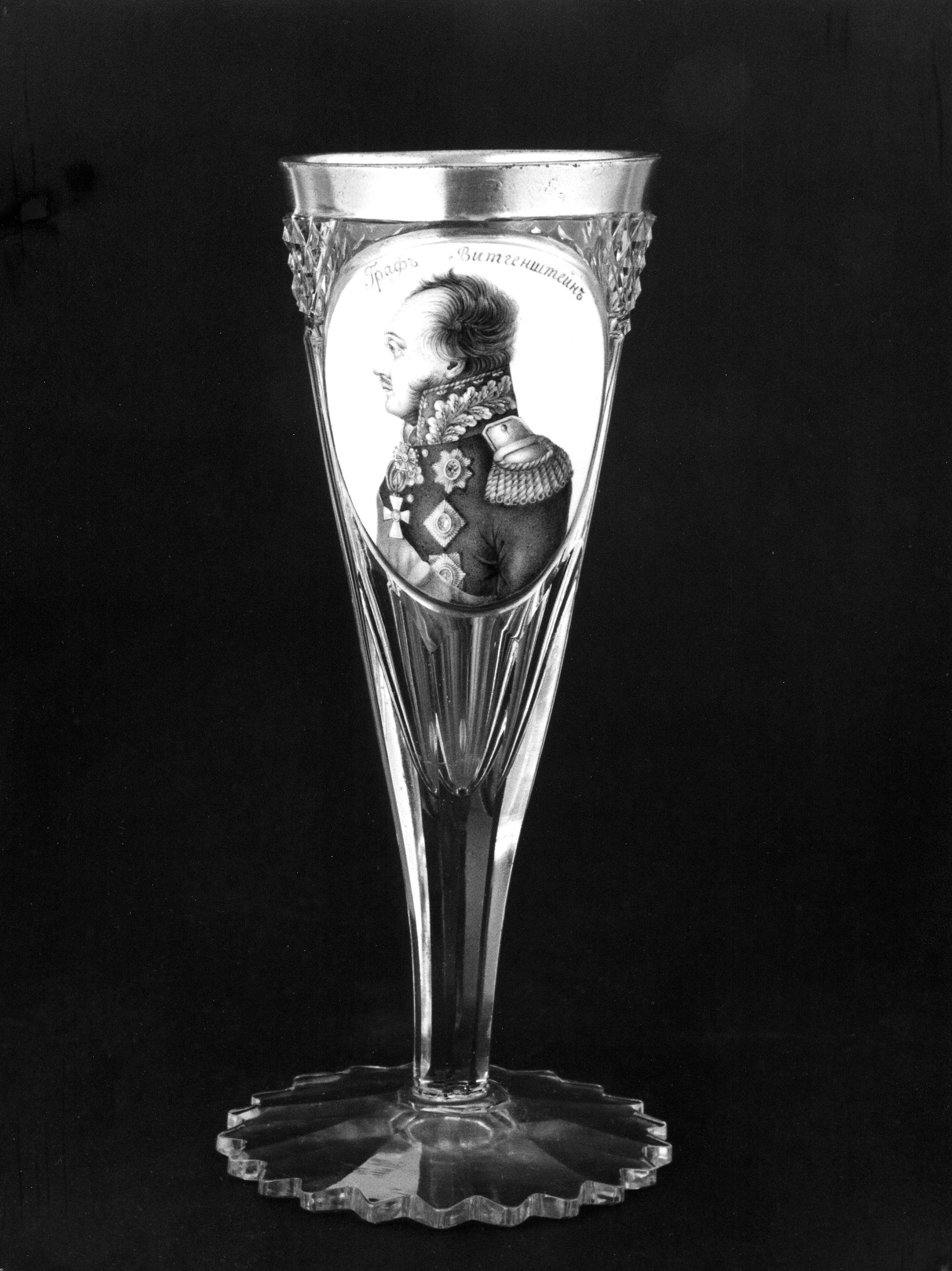 Sektflöte mit aufgesetztem Medaillon, Grisailleportrait auf weißem Grund: Feldmarschall Ludwig Adolf Peter Graf Wittgenstein [Ludwig Adolph Peter Graf zu Sayn-Wittgenstein]. Maler: A. Vershinin; Glaswerkstatt: Bakhmetev (1800-1825)